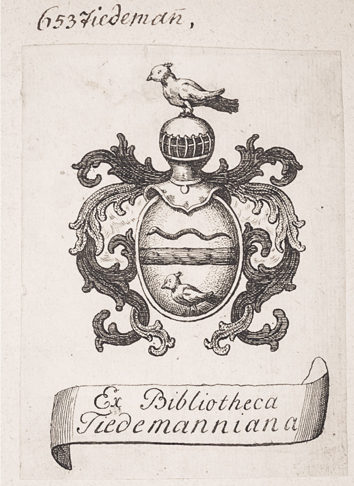 Wappen der Familie von Tiedemann